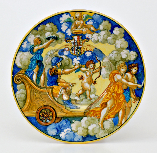 Piatto istoriato dipinto da Nicola da Urbino. Urbino XVI secolo.